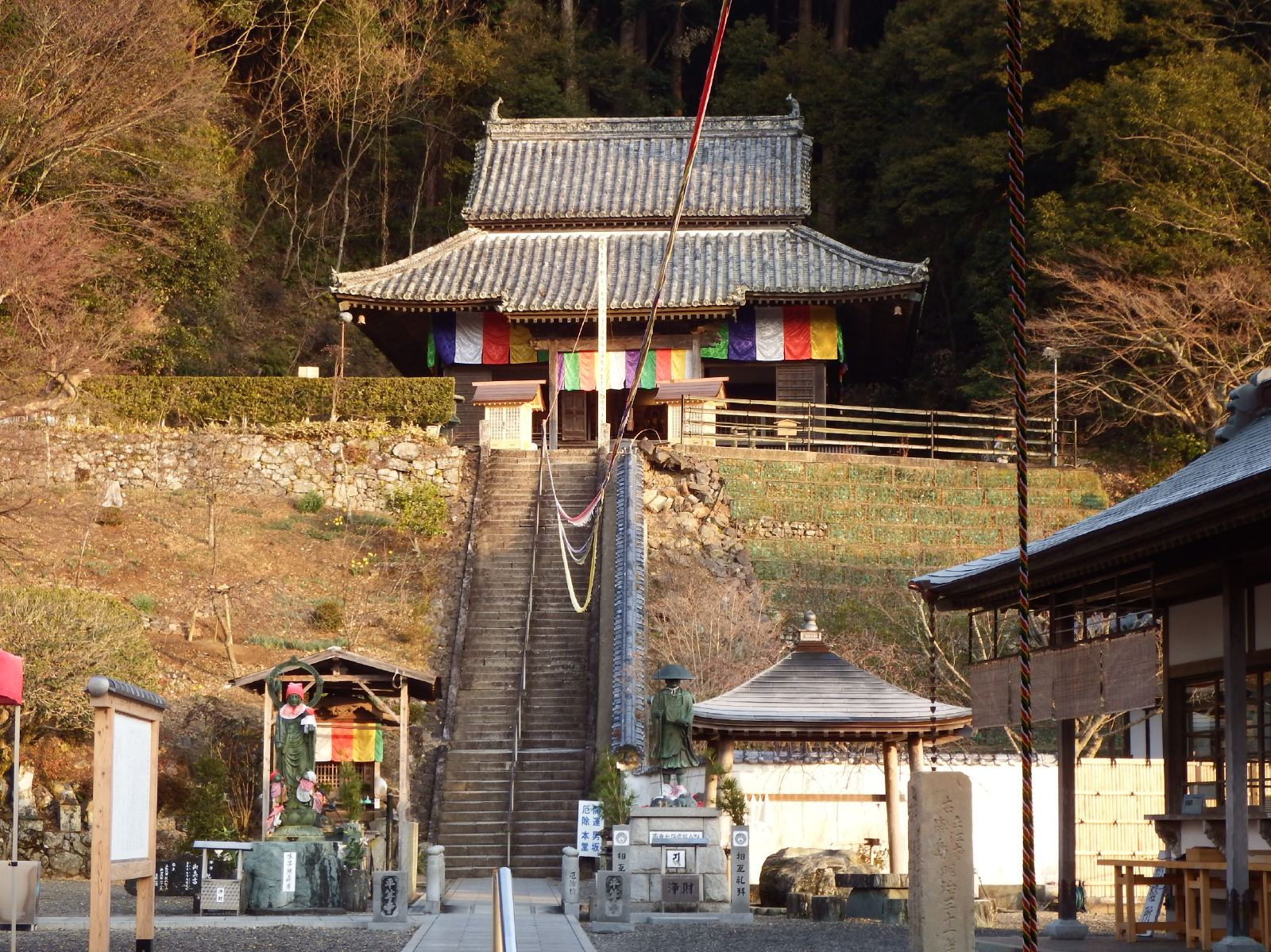 平等寺の本堂